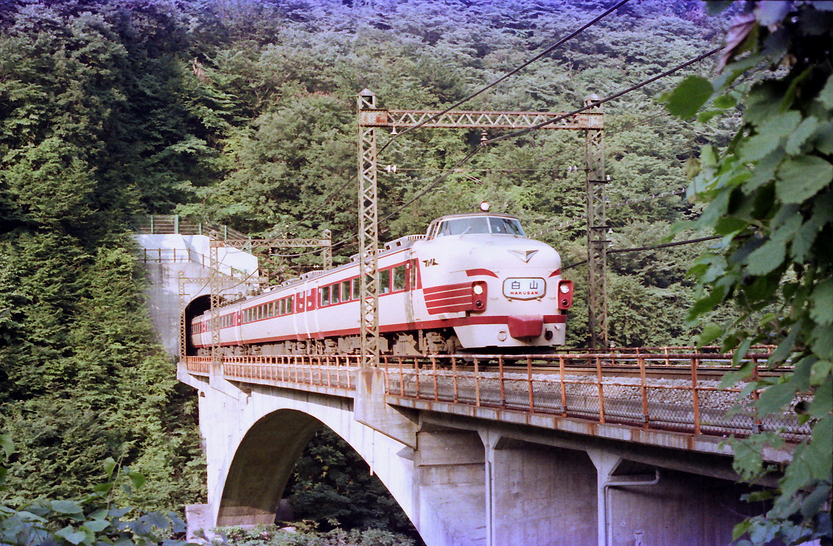 特急「白山」 上野駅－金沢駅